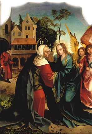 O retábulo "do Paraíso", assim designado uma vez que provém do altar-mor do extinto Convento do Paraíso em Lisboa, foi já objecto de alguns estudos que resultaram em opiniões diversas e divergentes no que toca à sua autoria. Num primeiro momento, o conjunto foi atribuído a Grão Vasco (Vasco Fernandes), por Taborda e Cirilo, opinião refutada por Raczynski que propôs o nome de Abram Prim (Primus). Carl Justi apontou como autor o pintor Velascus e Émile Bartaux dividiu a série em dois conjuntos, atribuindo a "Anunciação", a "Visitação" e a "Natividade" a Cristóvão de Figueiredo, e os restantes painéis ao "Mestre do Retábulo de Santiago". Foi, porém, José de Figueiredo quem reagropou novamente as oito pinturas e as enquadrou na obra do "Mestre do Paraíso", no que foi secundado por Reinaldo dos Santos. A Myron Malkiel-Jirmounsky, coube alertar para o facto de estarmos na presença de uma obra colectiva e não de um só pintor. Actualmente, e na esteira deste último historiador, ainda que se destaque o nome de Gregório Lopes na atribuição deste conjunto retabular, não há dúvida em se afirmar que se trata de uma obra de parceria, o que é desde logo visível na heterogeneidade pictórica e técnica das várias tábuas que o compõem.